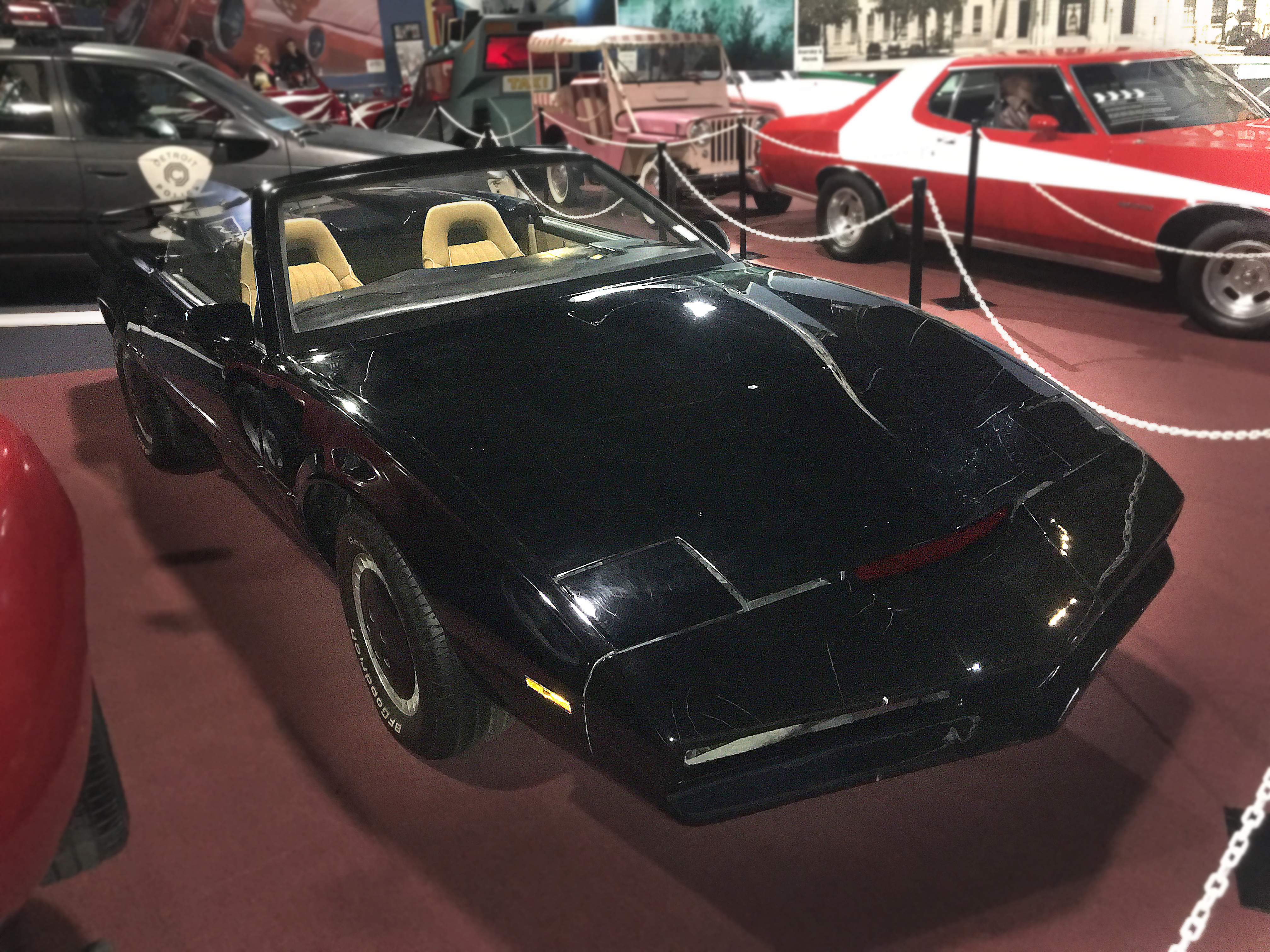 Original KITT #1196 at the Dezer Car Museum Miami